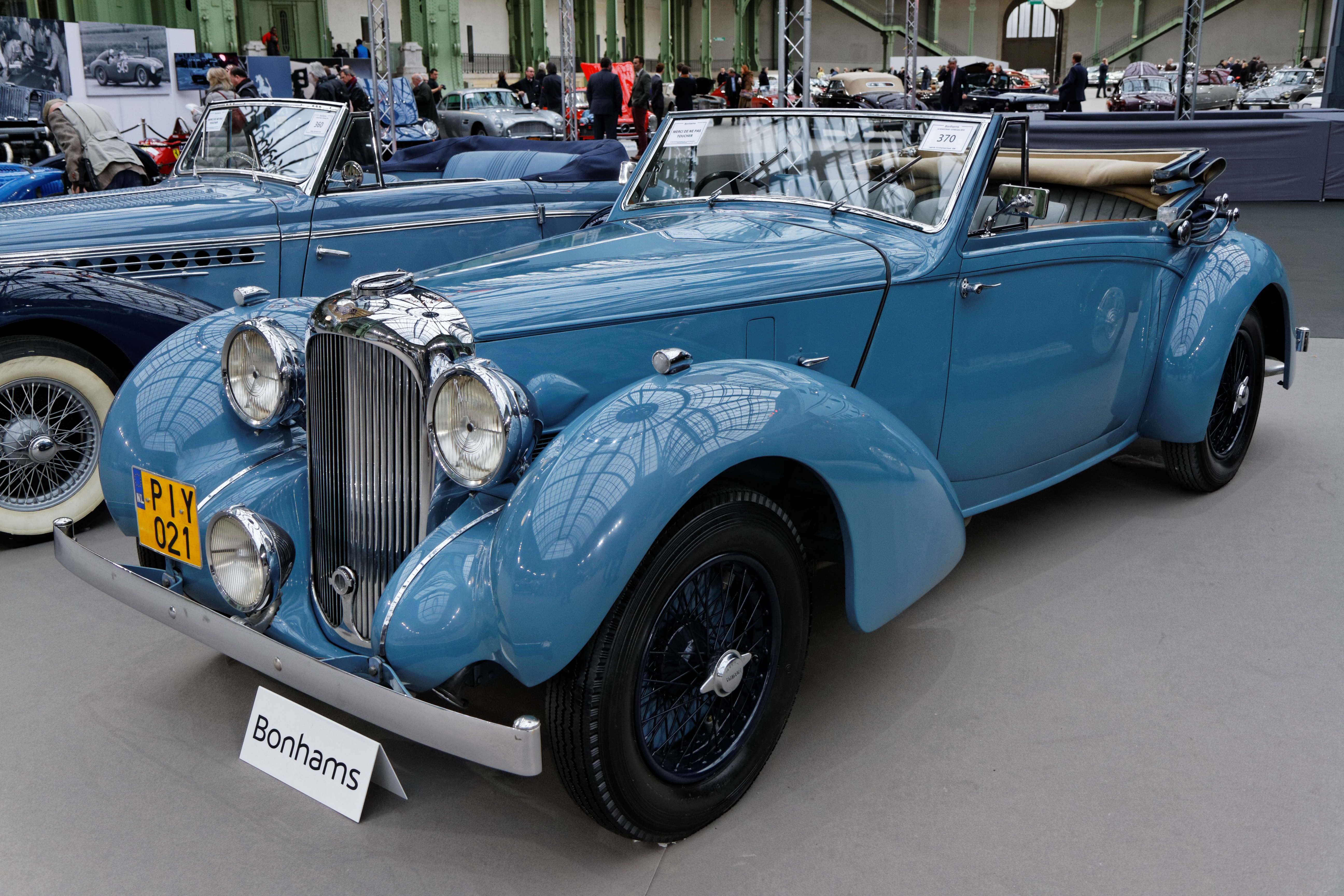 Une Lagonda V12 Drophead Coupé au Grand Palais lors de la vente Bonhams en février 2014.